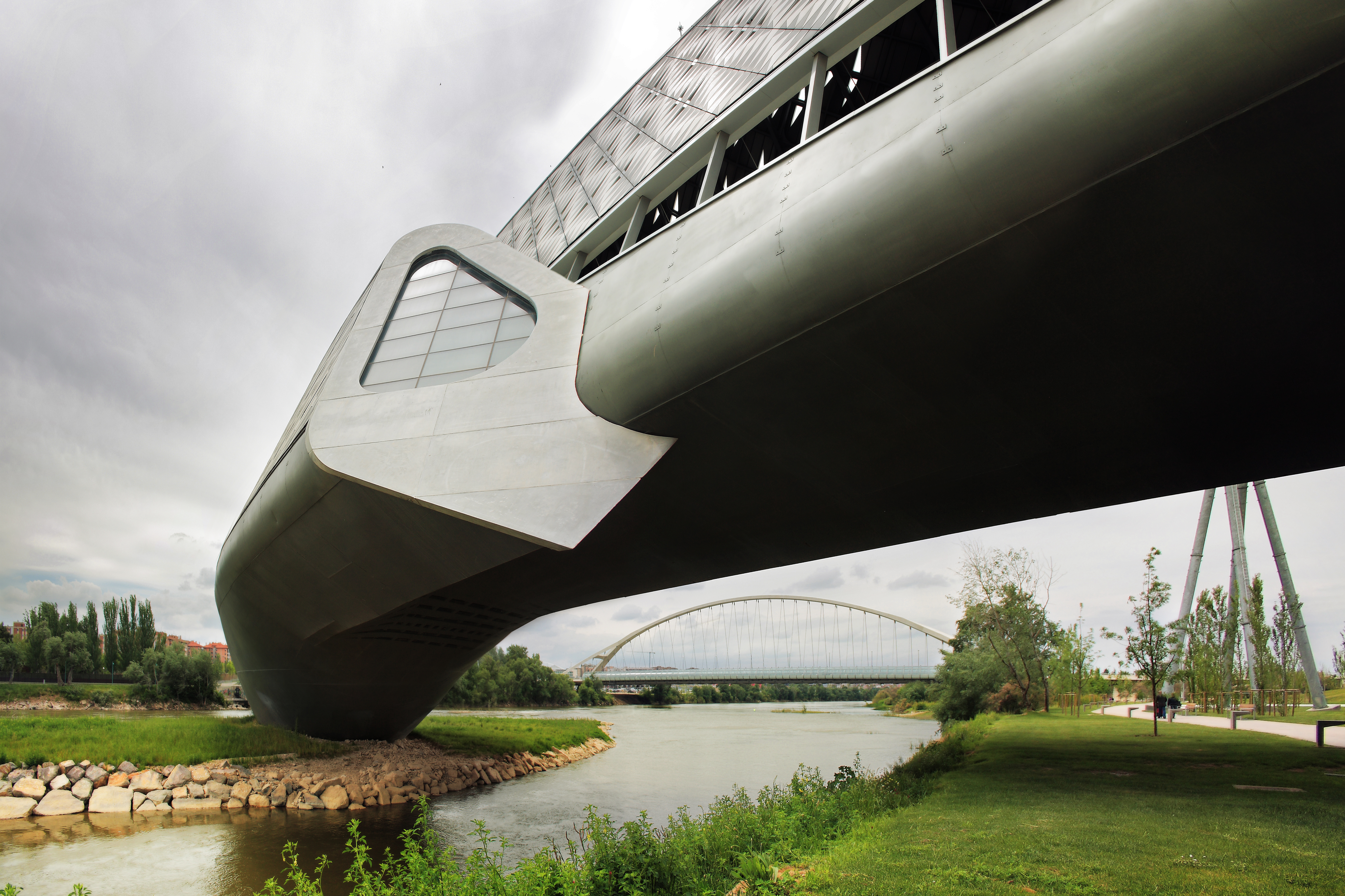 Bridge Pavilion & Third Millennium Bridge Río Ebro, Zaragoza, España